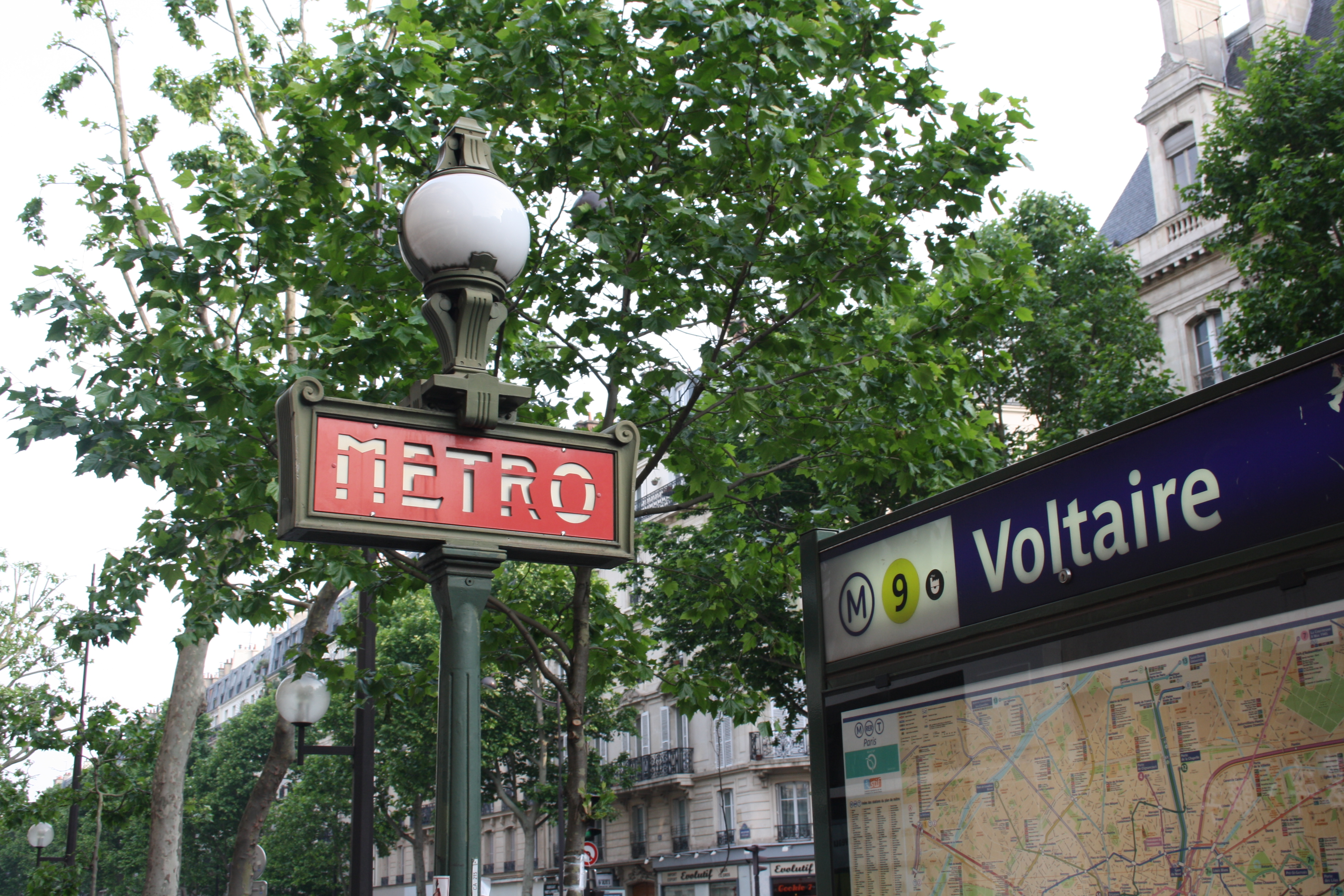 Voltaire metro station, Paris.